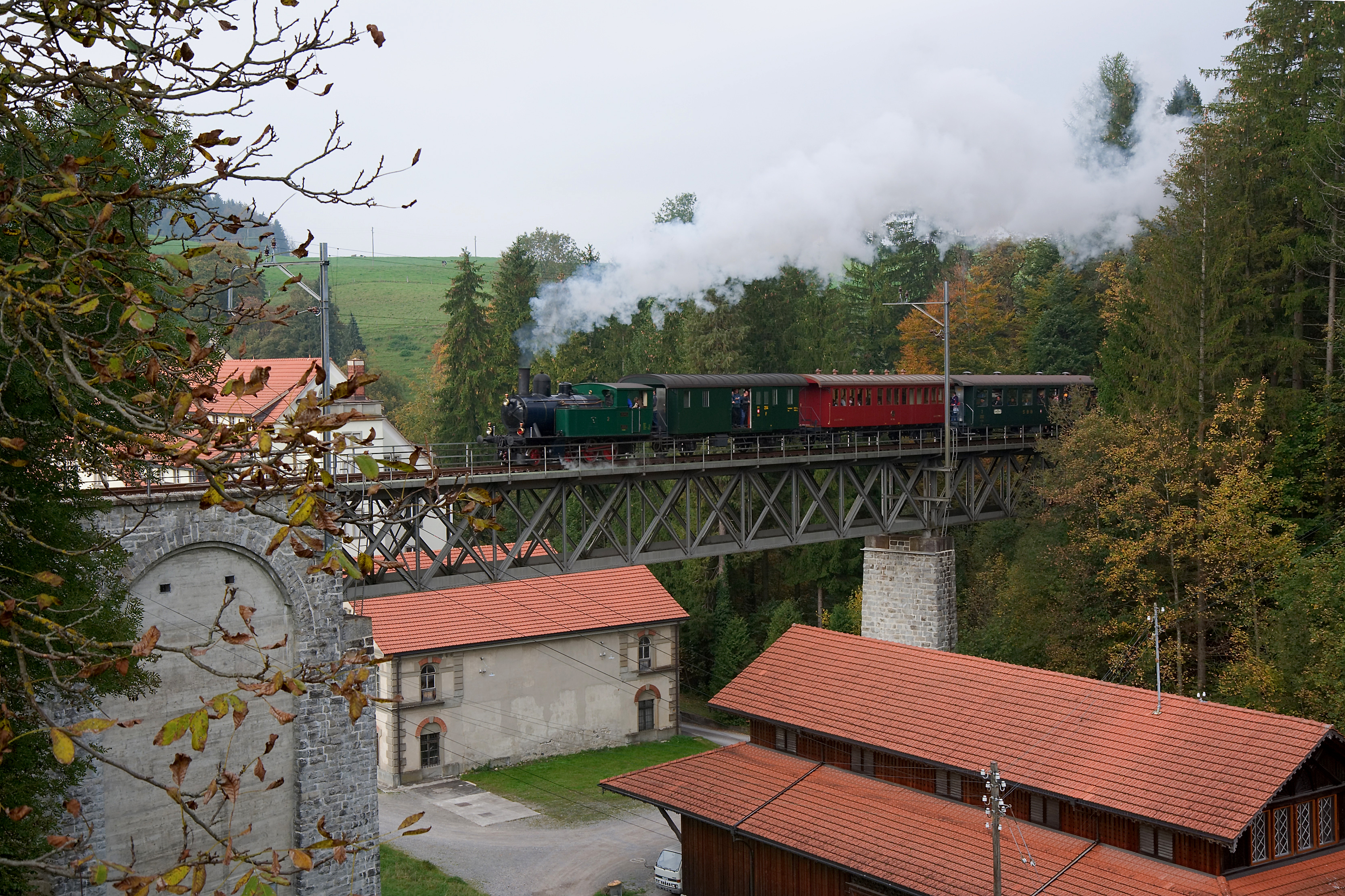 Zug der DVZO auf der Weissenbachbrücke in Neuthal, Gemeinde Bäretswil, Schweiz. Bei der Lokomotive handelt es sich höchstwahrscheinlich um die Ed 3/4 «Hinwil».